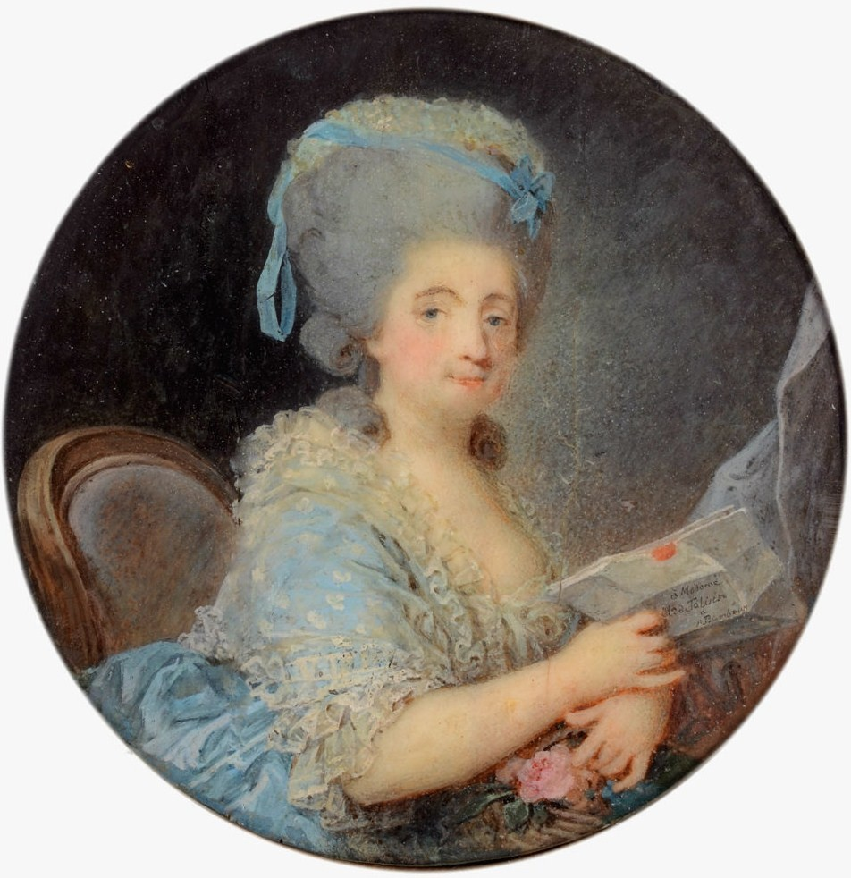 Мария Степановна Талызина, ур. Апраксина (1742-1896)